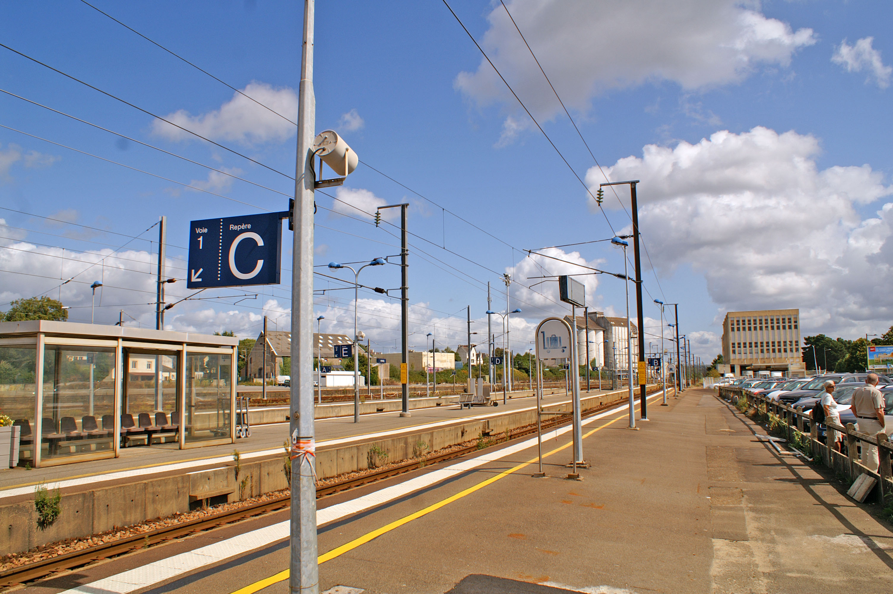 L'intérieur de la gare en direction de Redon. Au fond le silo UNICOPA.